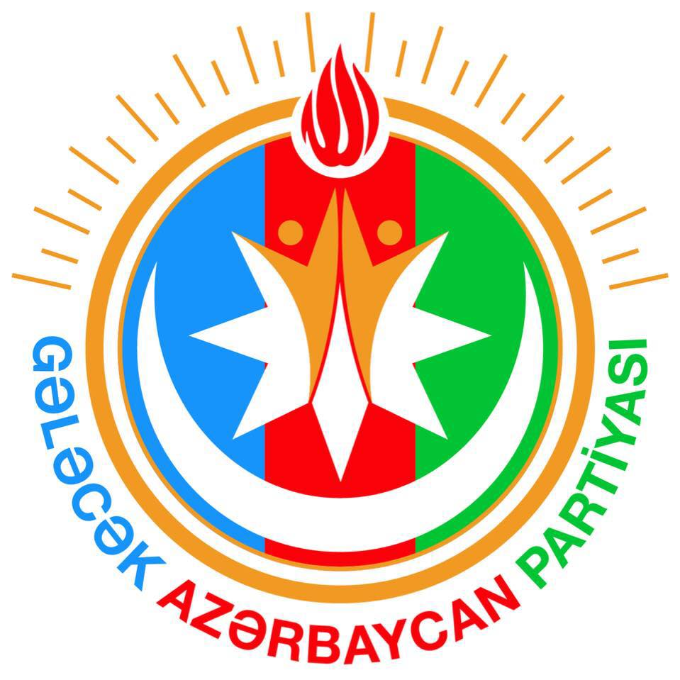 Gələcək Azərbaycan Partiyası Logosu